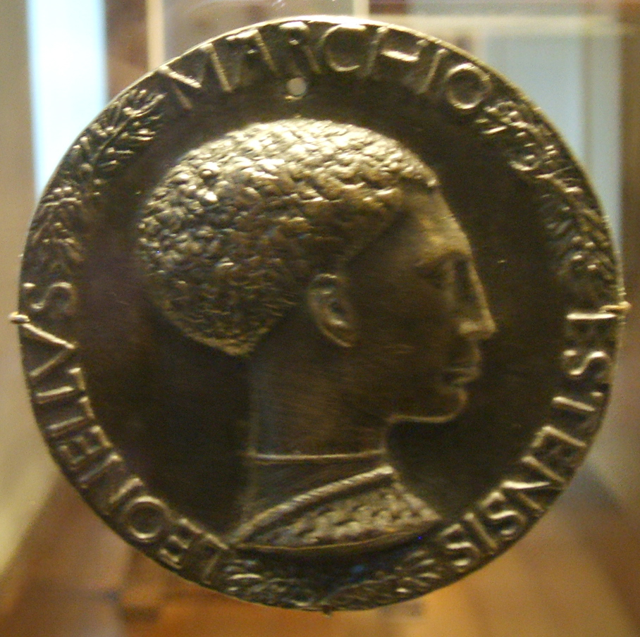 Medaglia di Leonello d'Este 1441-1443 recto. National Gallery in Washington d.c.